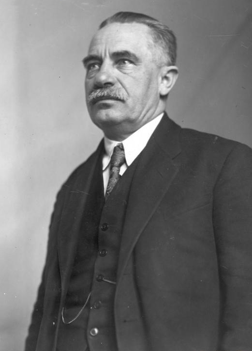 Jan Załuska